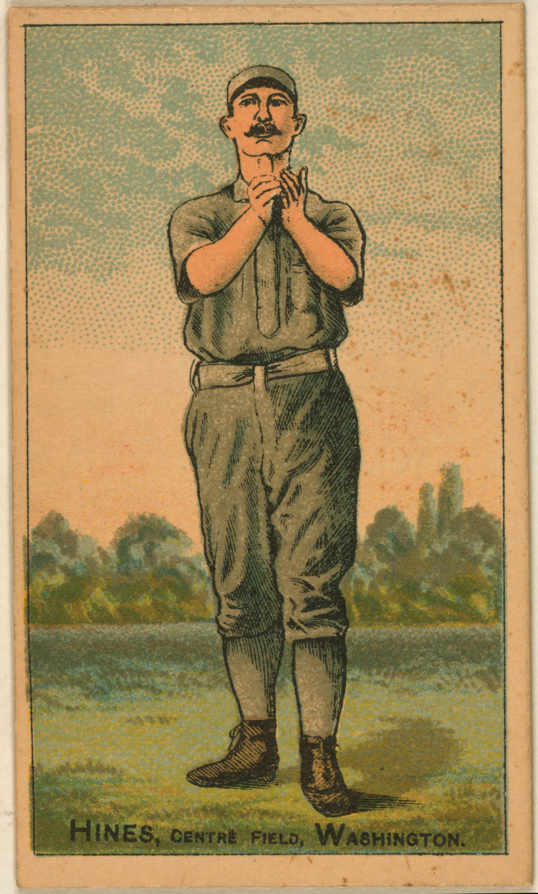 Paul Hines